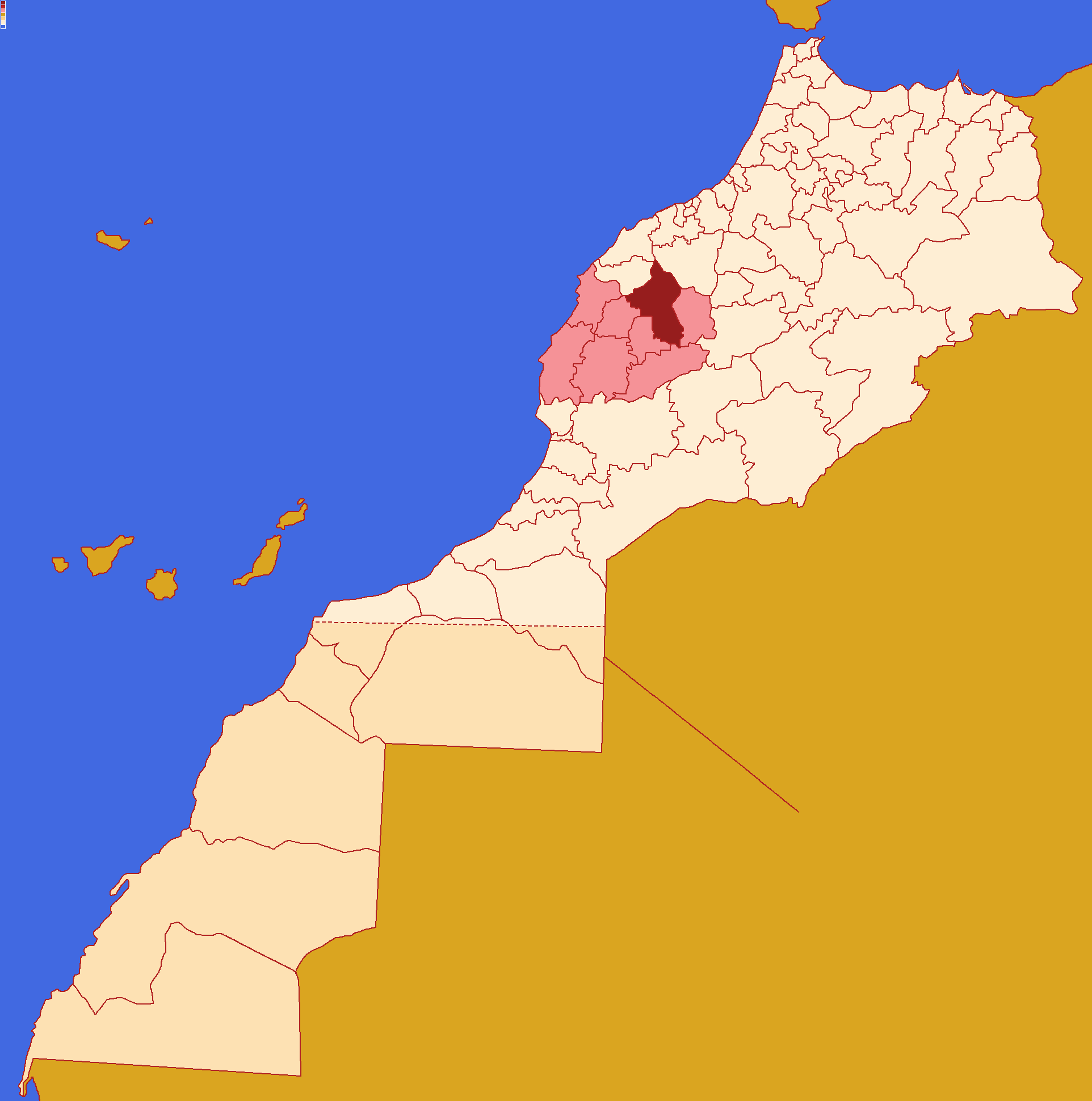 Localização da província de Rehamna ,dentro da região de Marraquexe-Safim e dentro de Marrocos. Conforme a reforma administrativa de 2015.